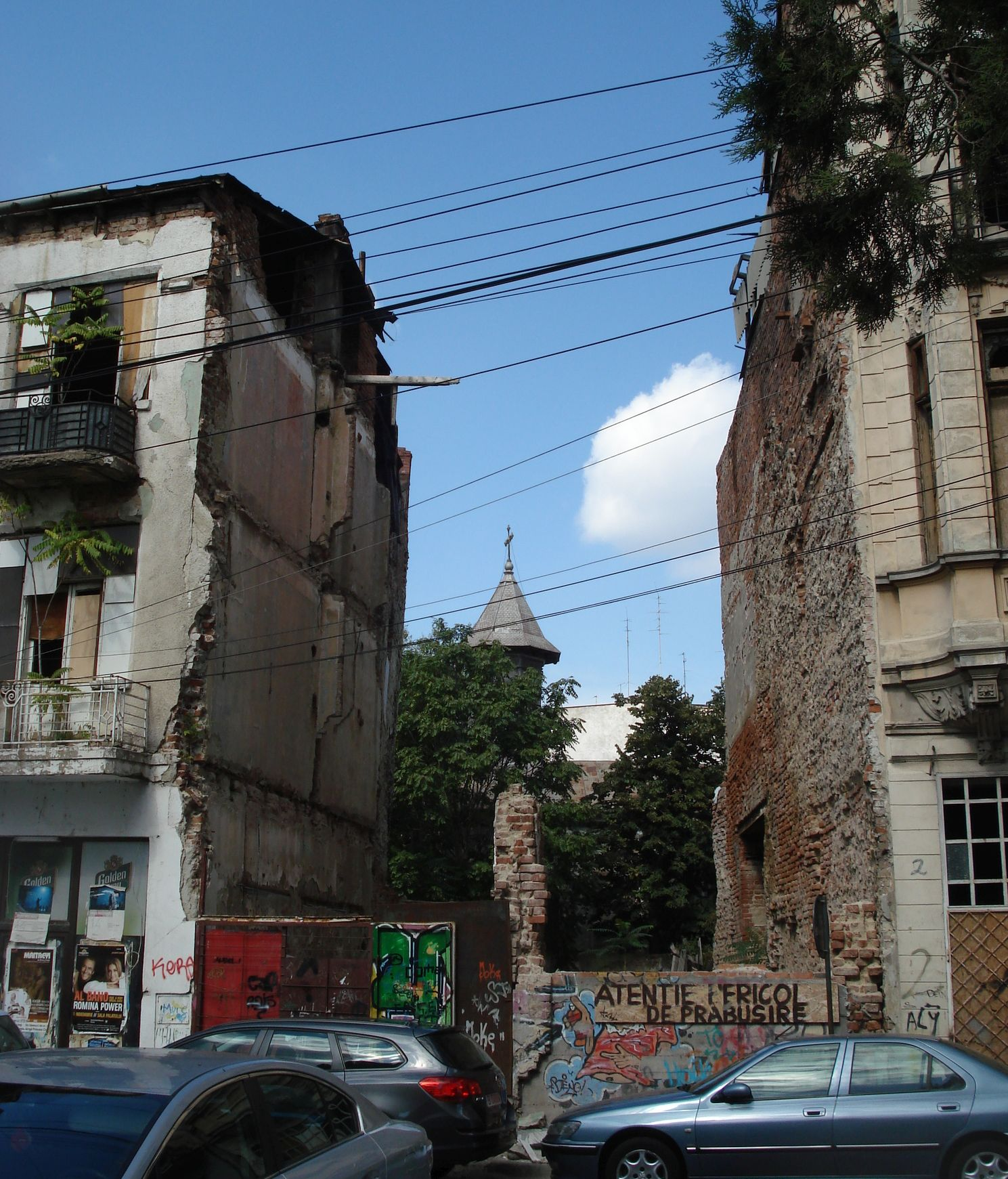 Str. Blanari nr. 4 si 6 (case prabusite)